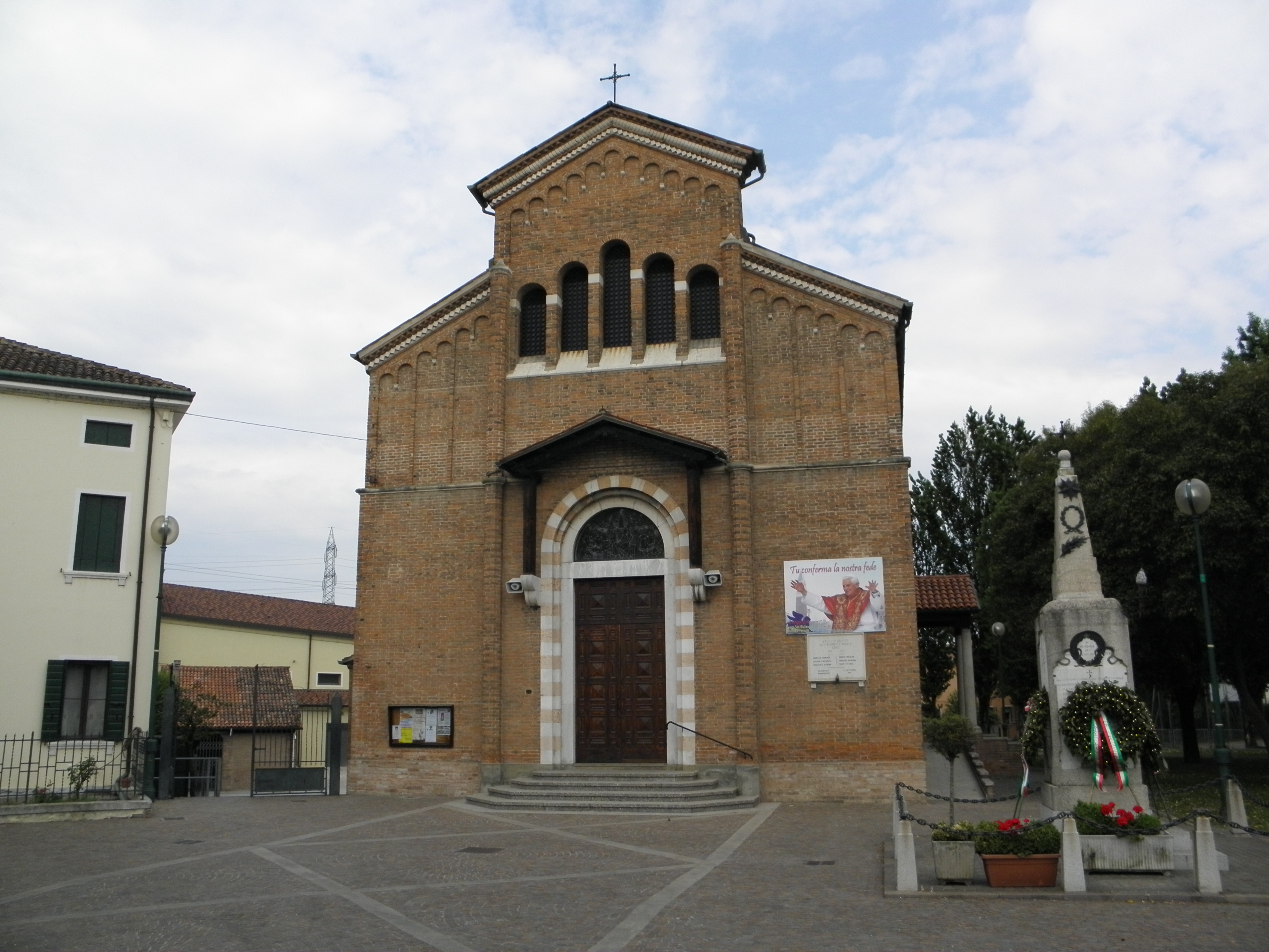 Malcontenta, località di Venezia: la chiesa parrocchiale di Sant'Ilario vescovo, erede canonica dell'Abbazia Sant'Ilario.